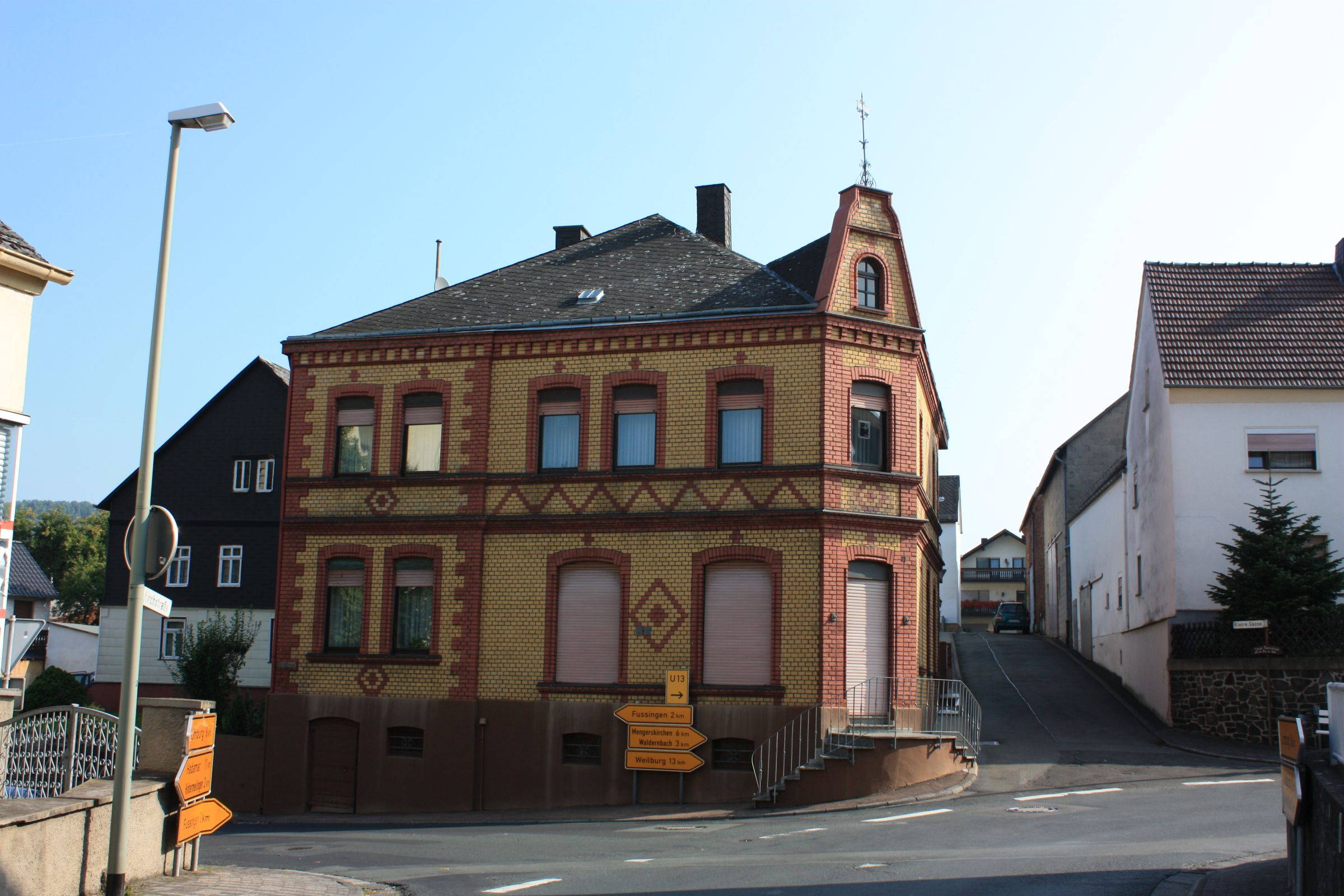 Ortsbildprägendes Wohn- und Geschäftshaus in Lahr, Waldbrunn, Hessen (erbaut 1891 oder 1897)